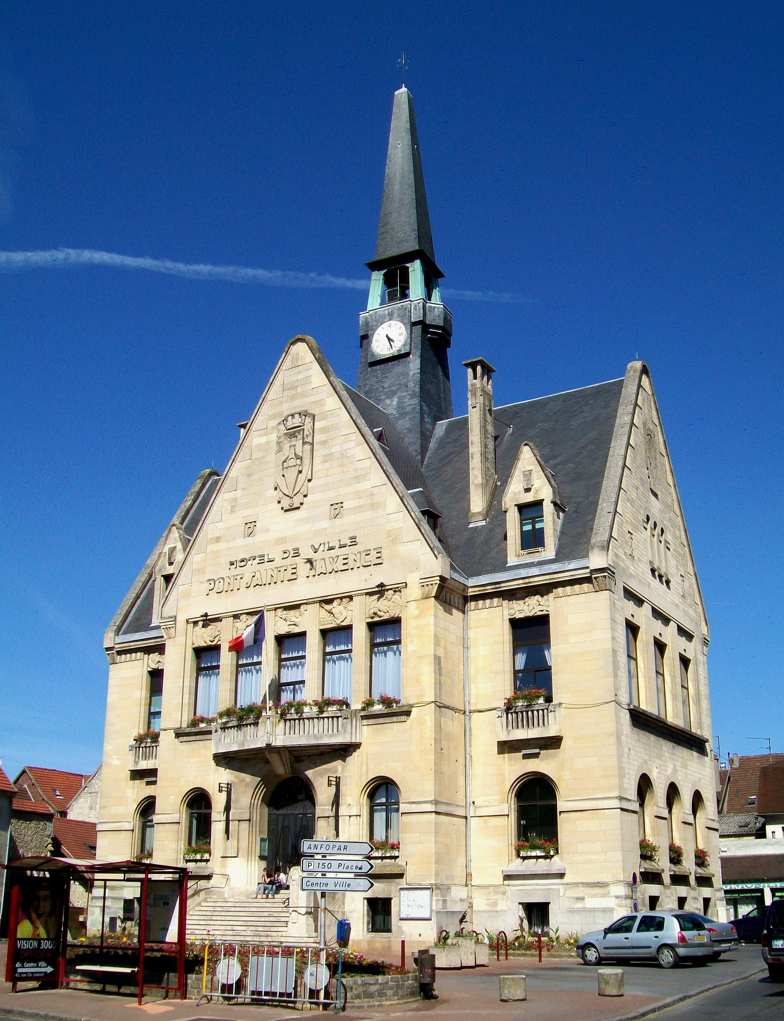 L'Hôtel de Ville de 1930.